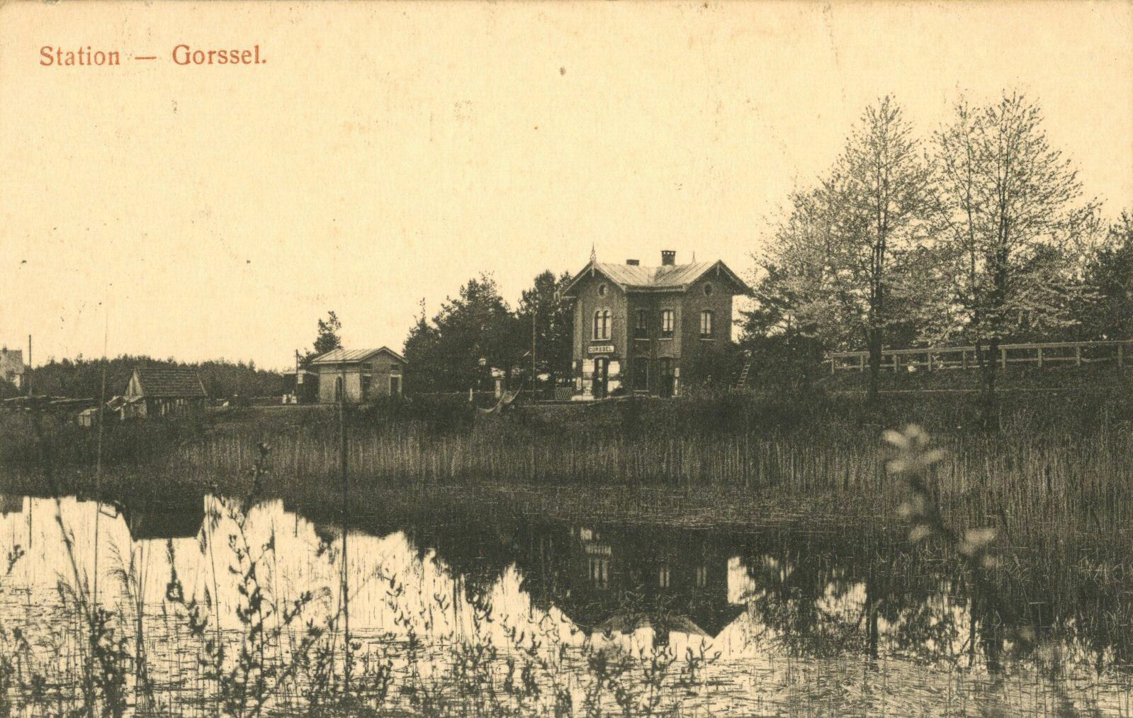 Gezicht op het S.S.-station Gorssel te Gorssel.